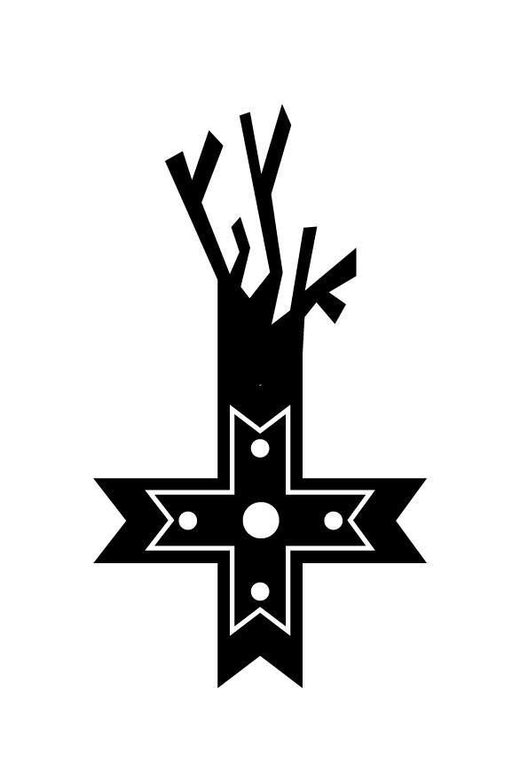 Fenno-Ugria Noored logo